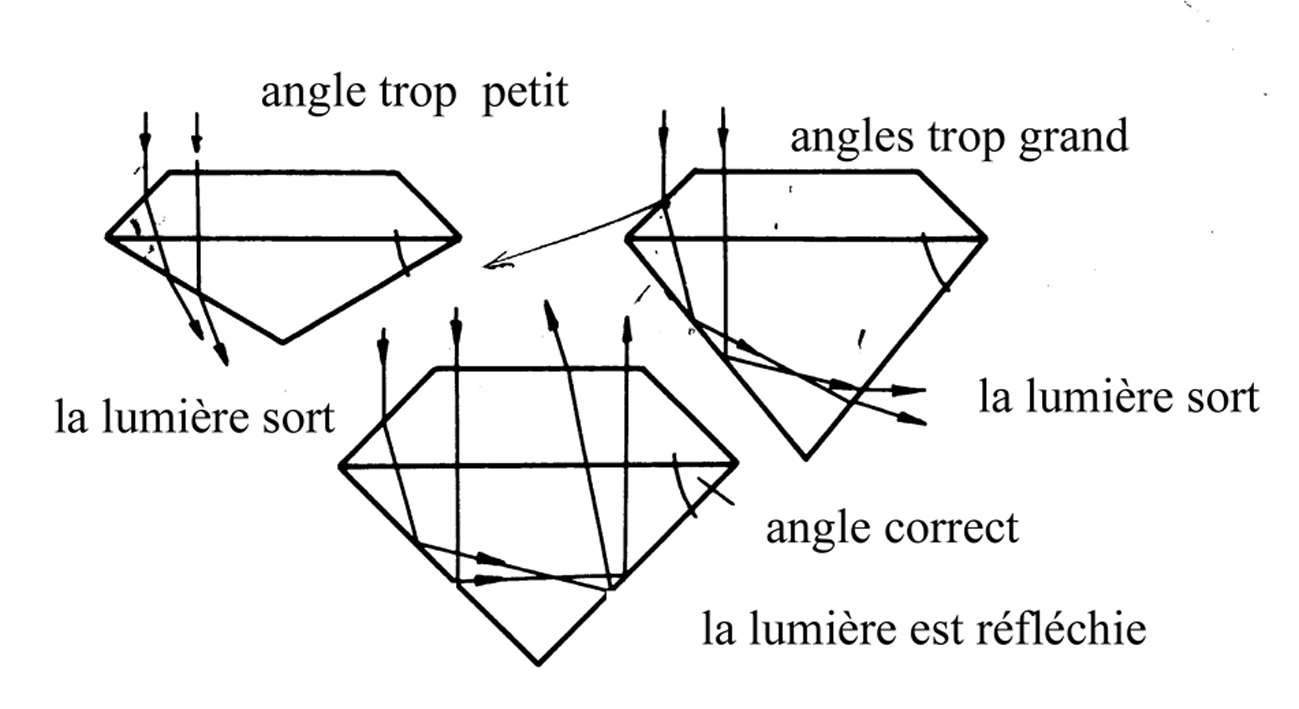 les angles de la taille d'une pierre gemme nécessaire pour une bonne brillance